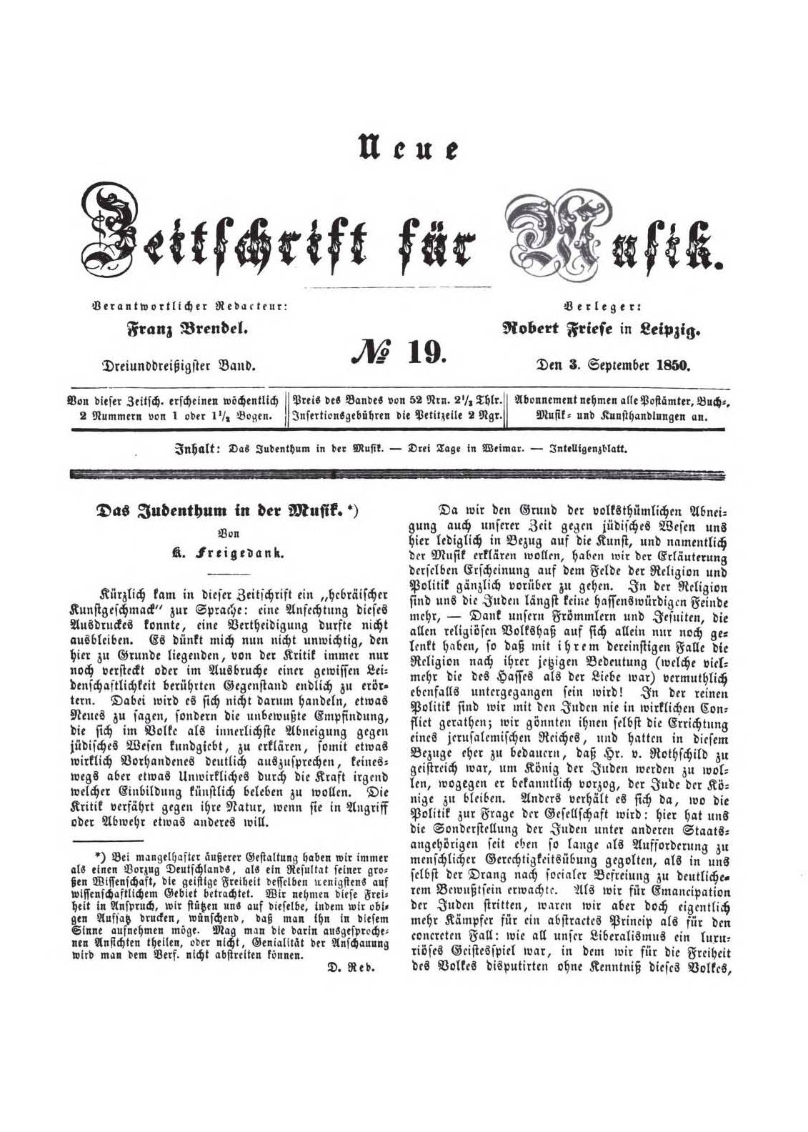 Titelseite der Zeitschrift / Title page of the periodical